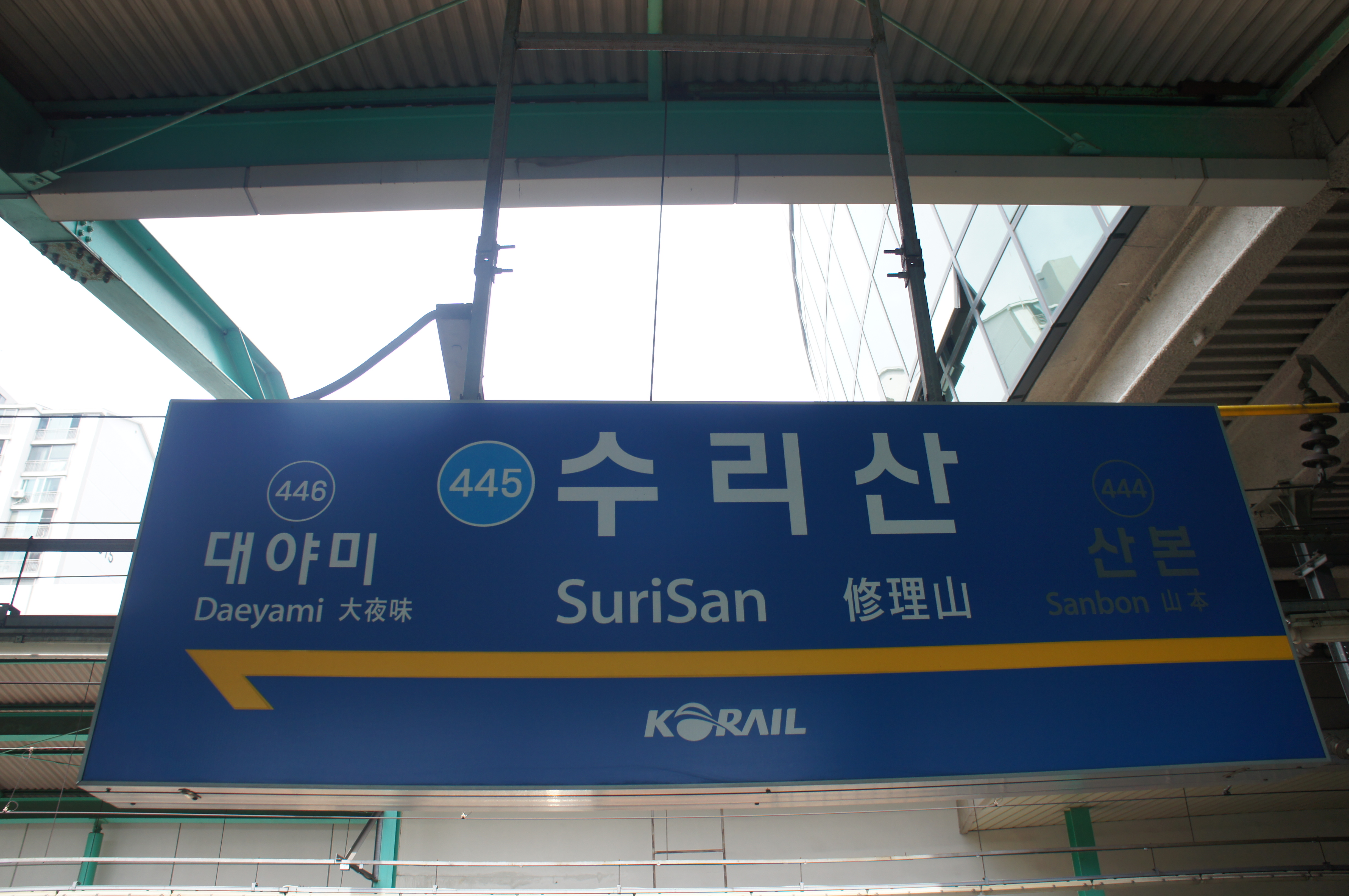 수리산역 역명판